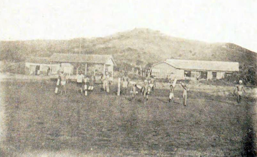 中文（台灣）: 通霄海水浴場舊照